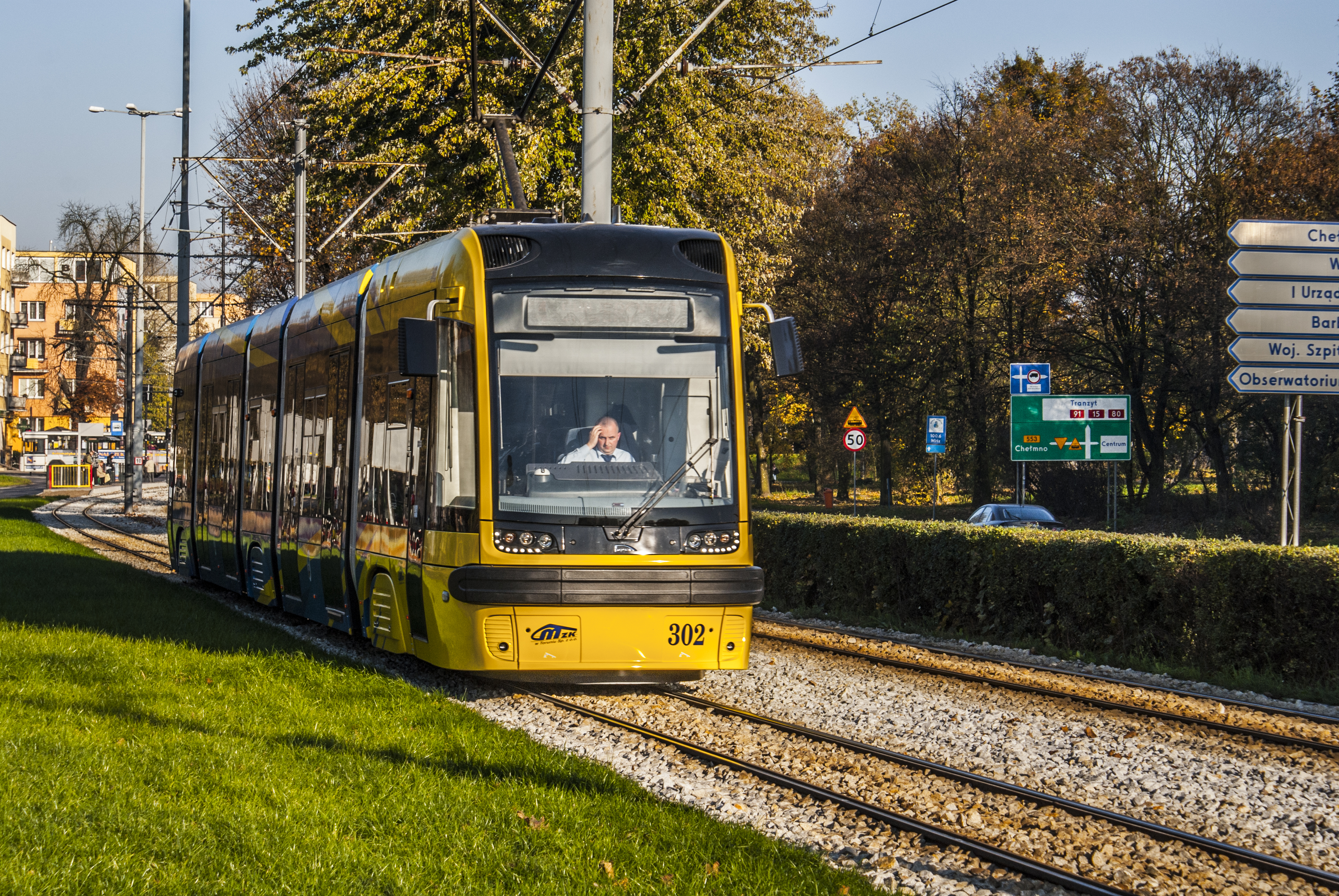 Toruński tramwaj PESA Swing 122NbT, numer taborowy: 302